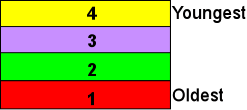 ภาพแสดงกฏการซ้อนทับของชั้นหิน โดยตัวเลขแสดงลำดับการเกิดของชั้นหิน